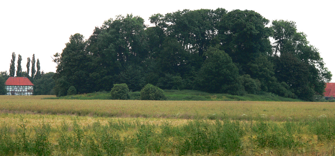 Burhügel von Burg und späterem Schloss Wölpe in Erichshagen